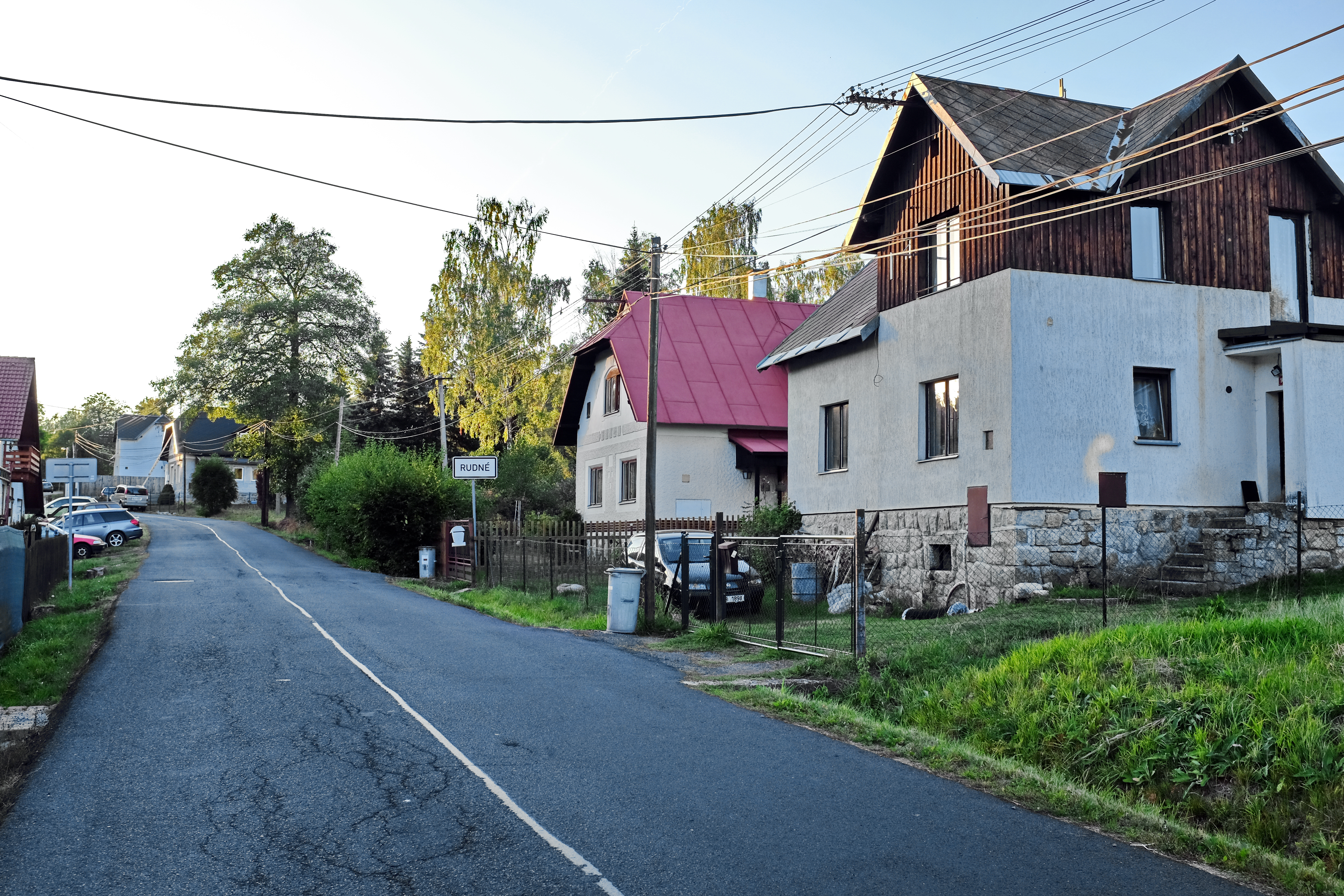 Rudné, část obce Vysoká Pec, Krušné hory, okres Karlovy Vary